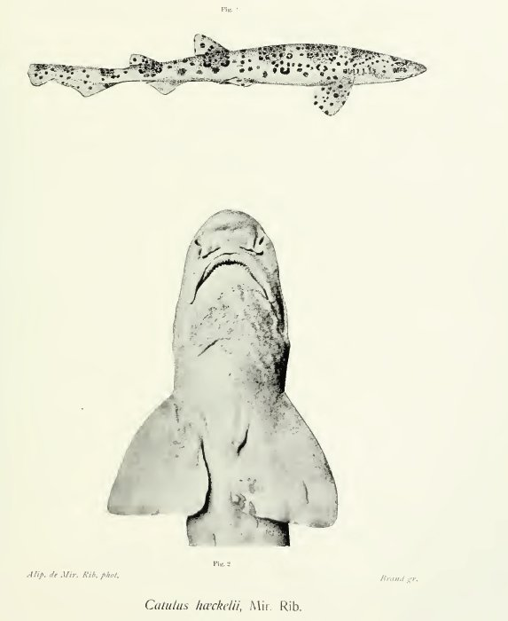 Фотография, сопровождавшая первое научное описание бразильской кошачьей акулы Scyliorhinus haeckelii syn. Catulus haeckelii